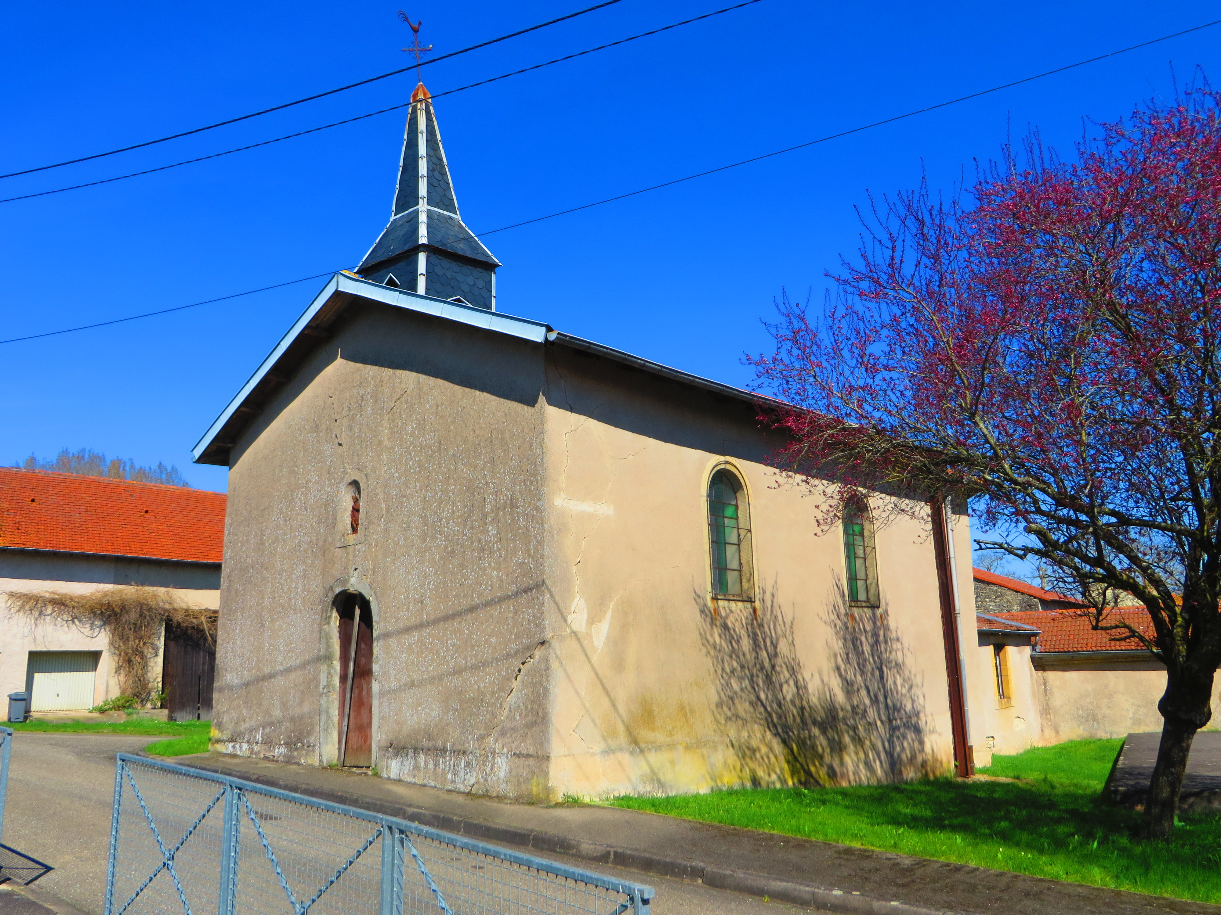 Thonville Église de la Très-Sainte-Trinité